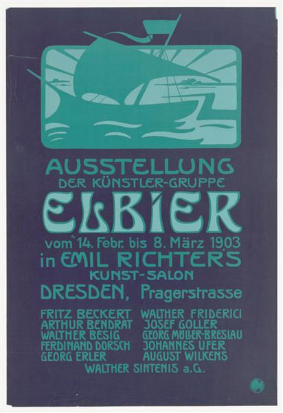 Plakat: Die Elbier - Kunstausstellung in Emil Richters Kunstsalon 1903, Prager Straße, Dresden. Um 1902/1903.